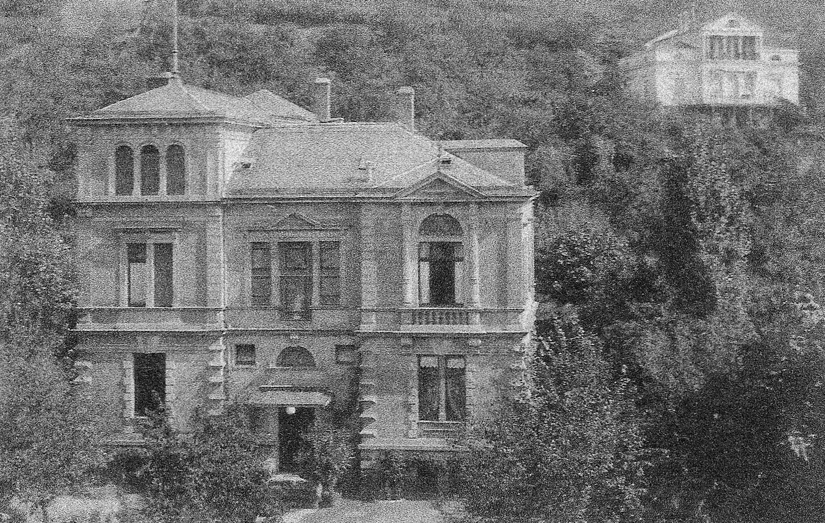 Villa Bülow Gaisberstraße 81 in Heidelberg, Entwurf und Durchführung Jakob Henkenhaf um 1894